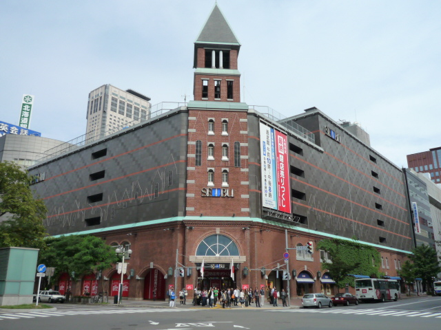 閉店セール期間中の札幌西武。